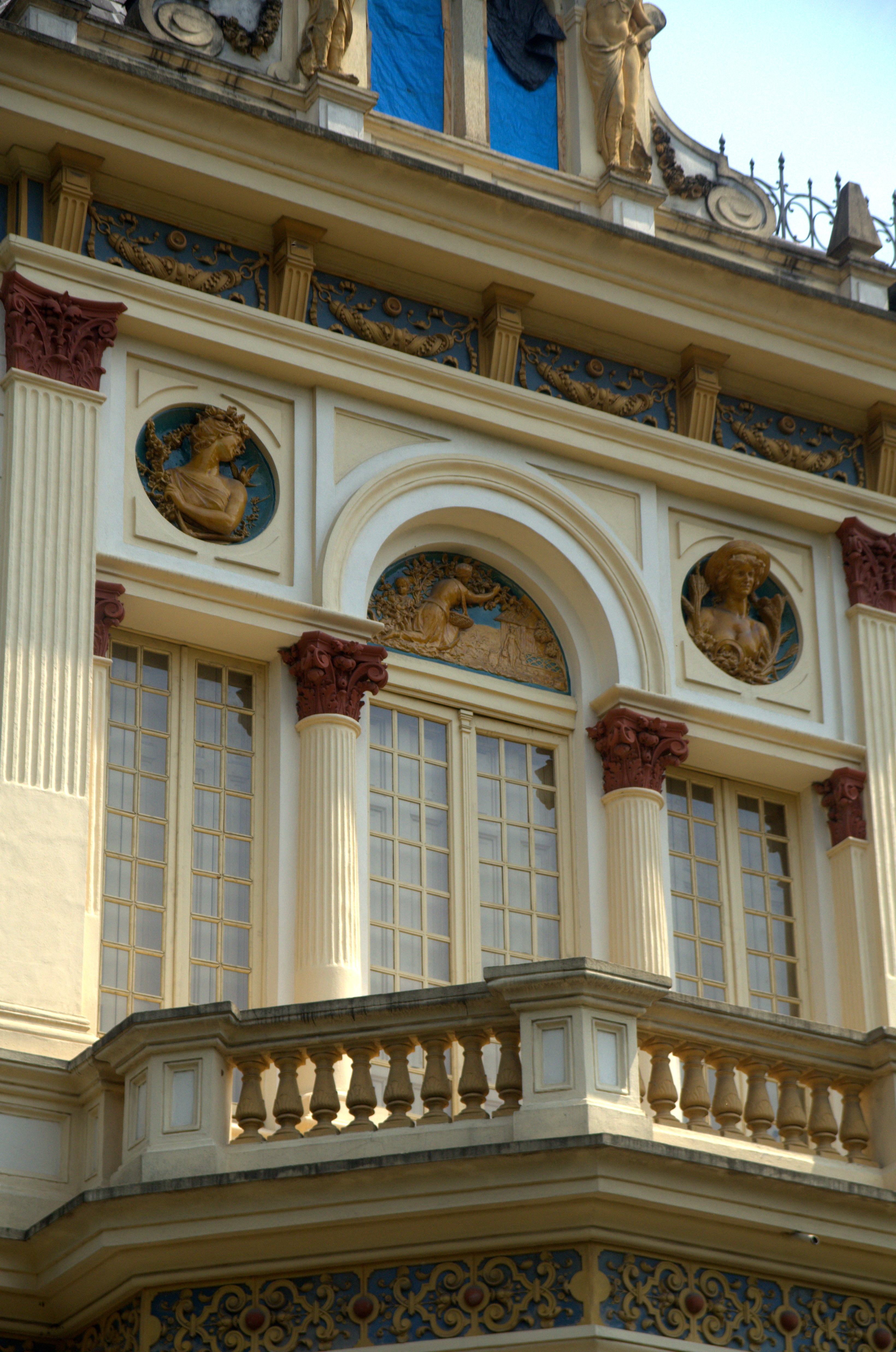 DETALHES FACHADA PALÁCIO DOS CAMPOS ELÍSIOS